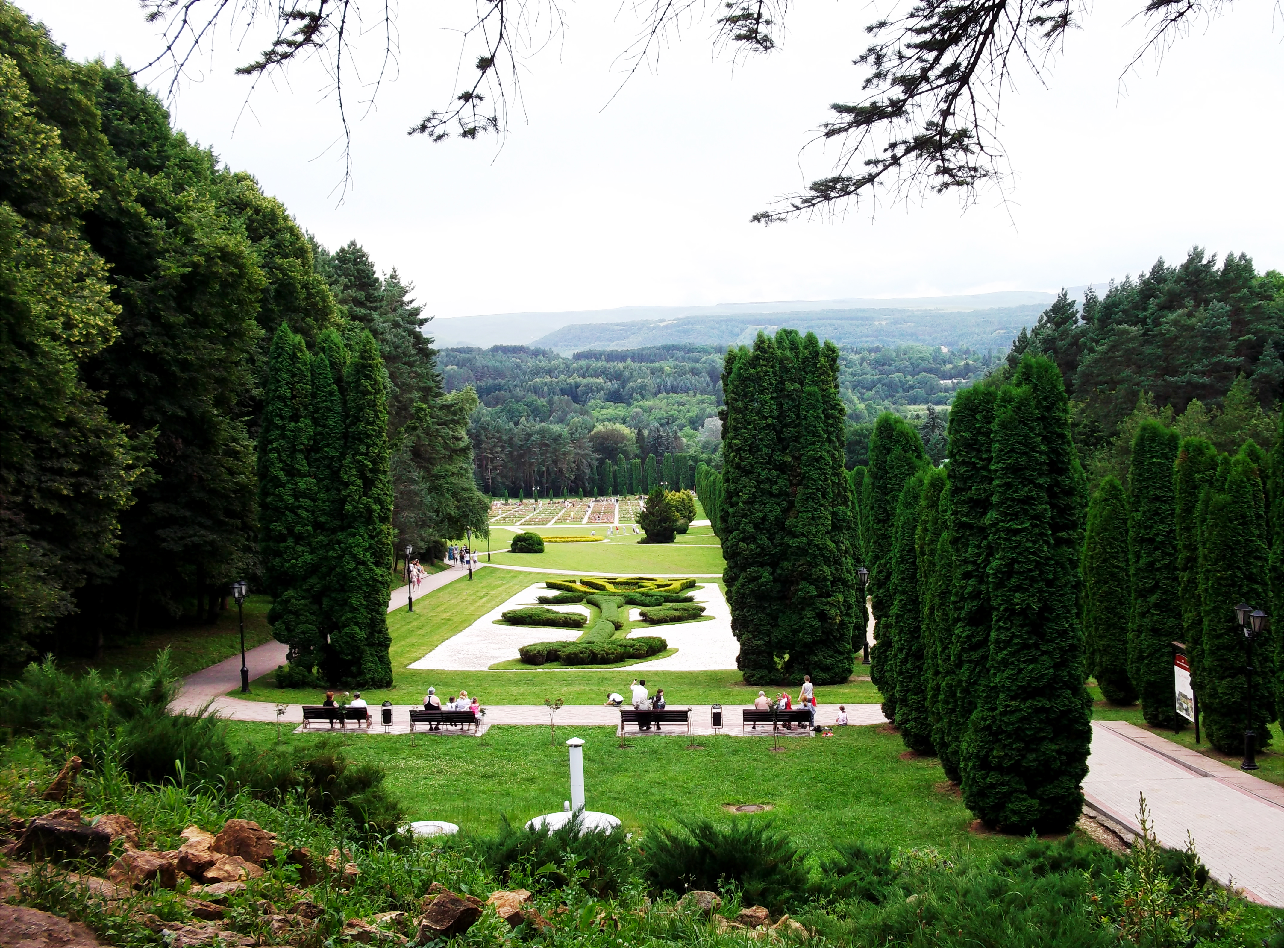 Курортный парк: по долине р. Ольховки, на склонах Джинальского хребта; высота над уровнем моря 800-1360 метров, Кисловодск, Ставропольский край